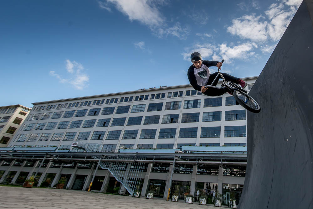 Een bmx'er toont zijn trucjes op Strijp-S.